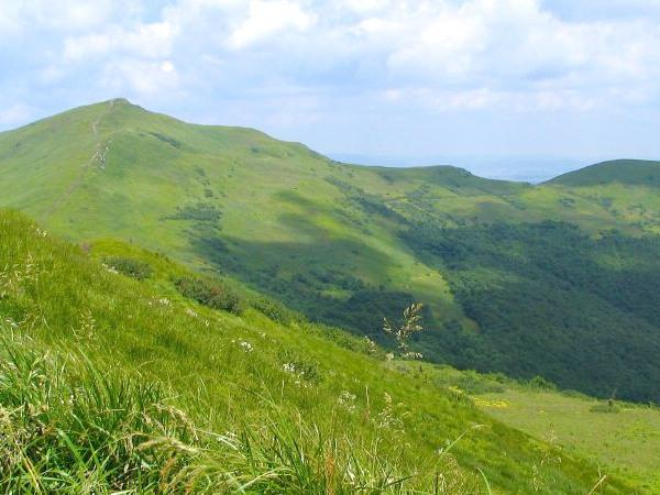 Halicz widziany z Rozsypańca, Bieszczady